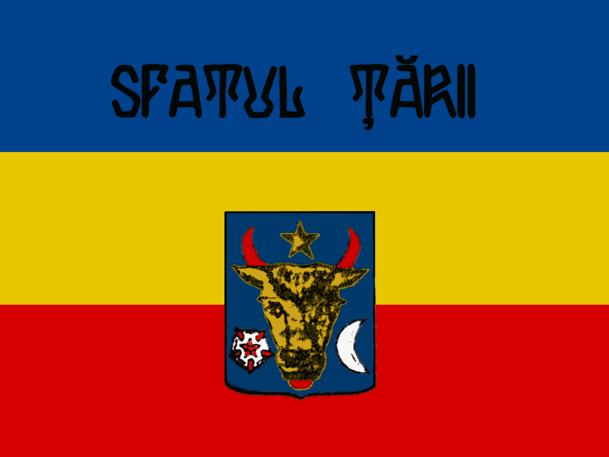 Flag of Democratic Republic of Moldova (1917 - 1918). Model found and discussed in: Silviu Andrieş-Tabac, Heraldica teritorială a Basarabiei şi Transnistriei, Ed. Museum, Chişinău, 1998.